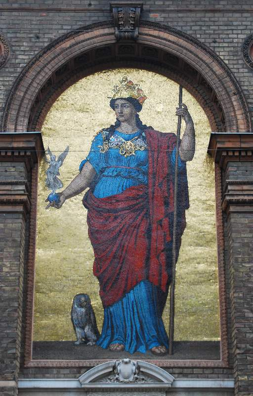 Der Minervabrunnen ist ein am Stubenring im 1. Wiener Gemeindebezirk Innere Stadt gelegener Wandbrunnen.